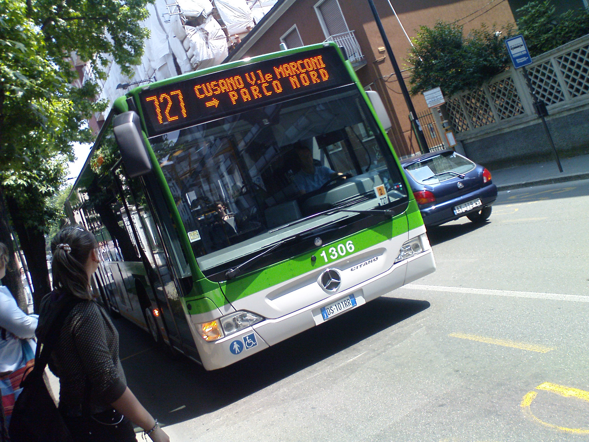 Opera propria. Foto di un autobus della linea 727 in arrivo alla fermata di Monte Ortigara.